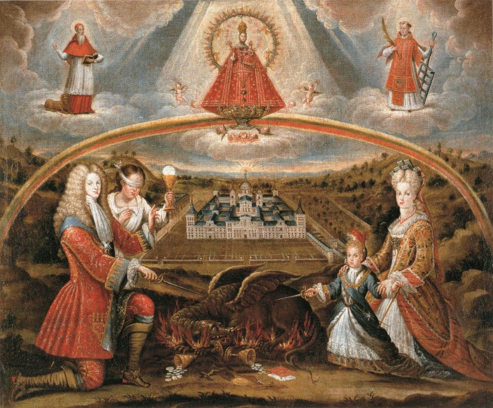 Felipe V venciendo a la Herejía, Patrimonio Nacional, Monasterio de El Escorial